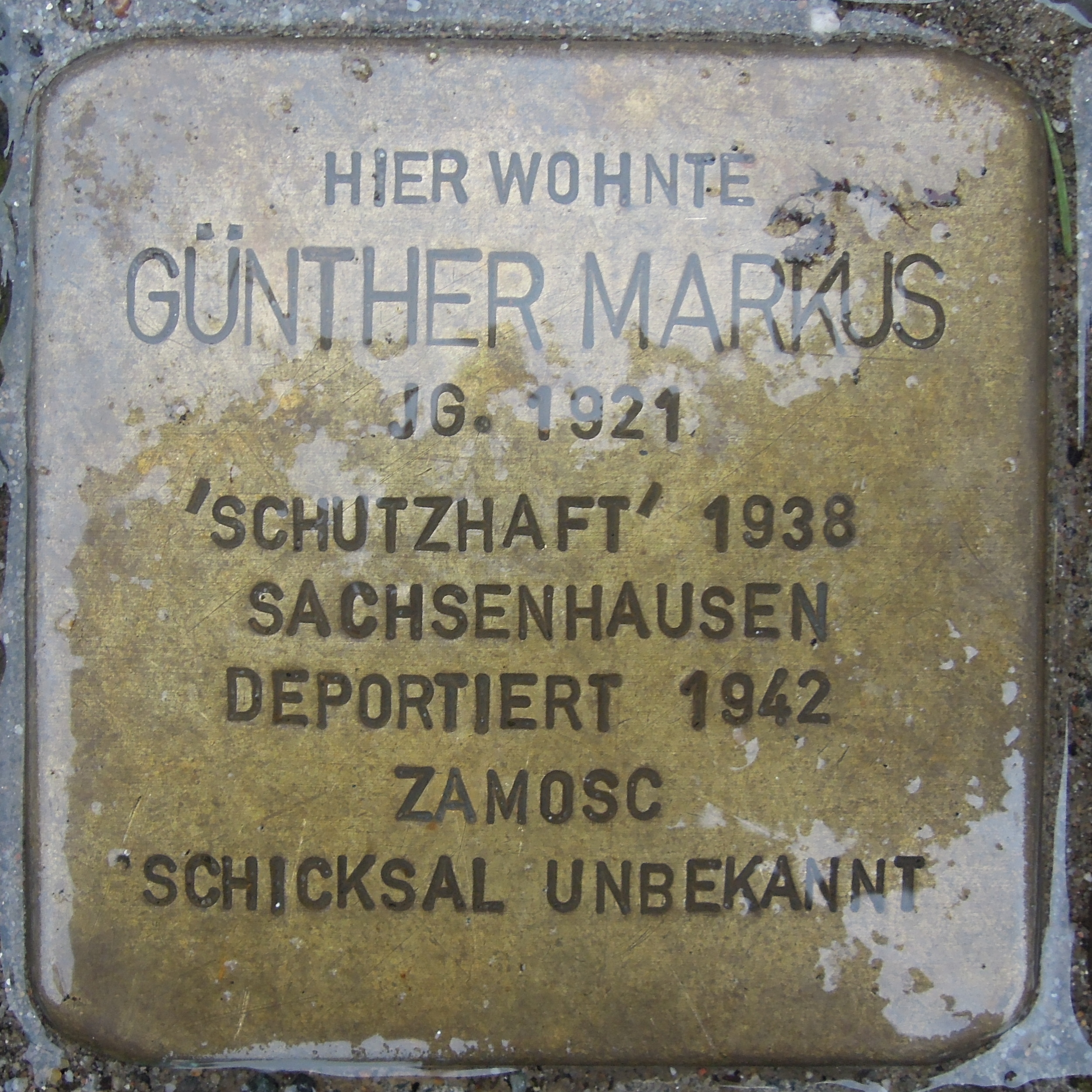 Stolperstein Hattingen Bahnhofstraße 6 für Günther Markus